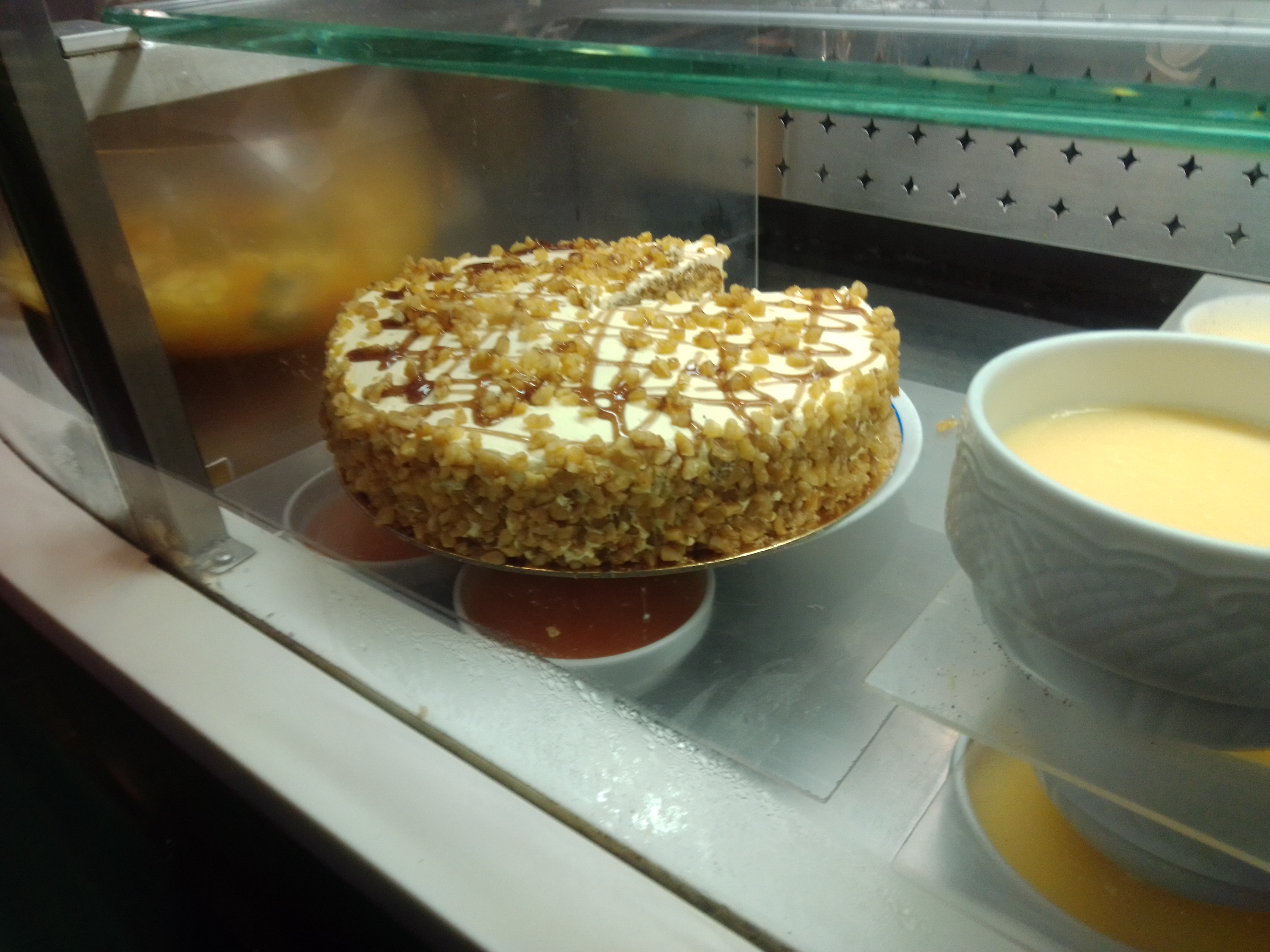 Tarta de nuez de Portugal